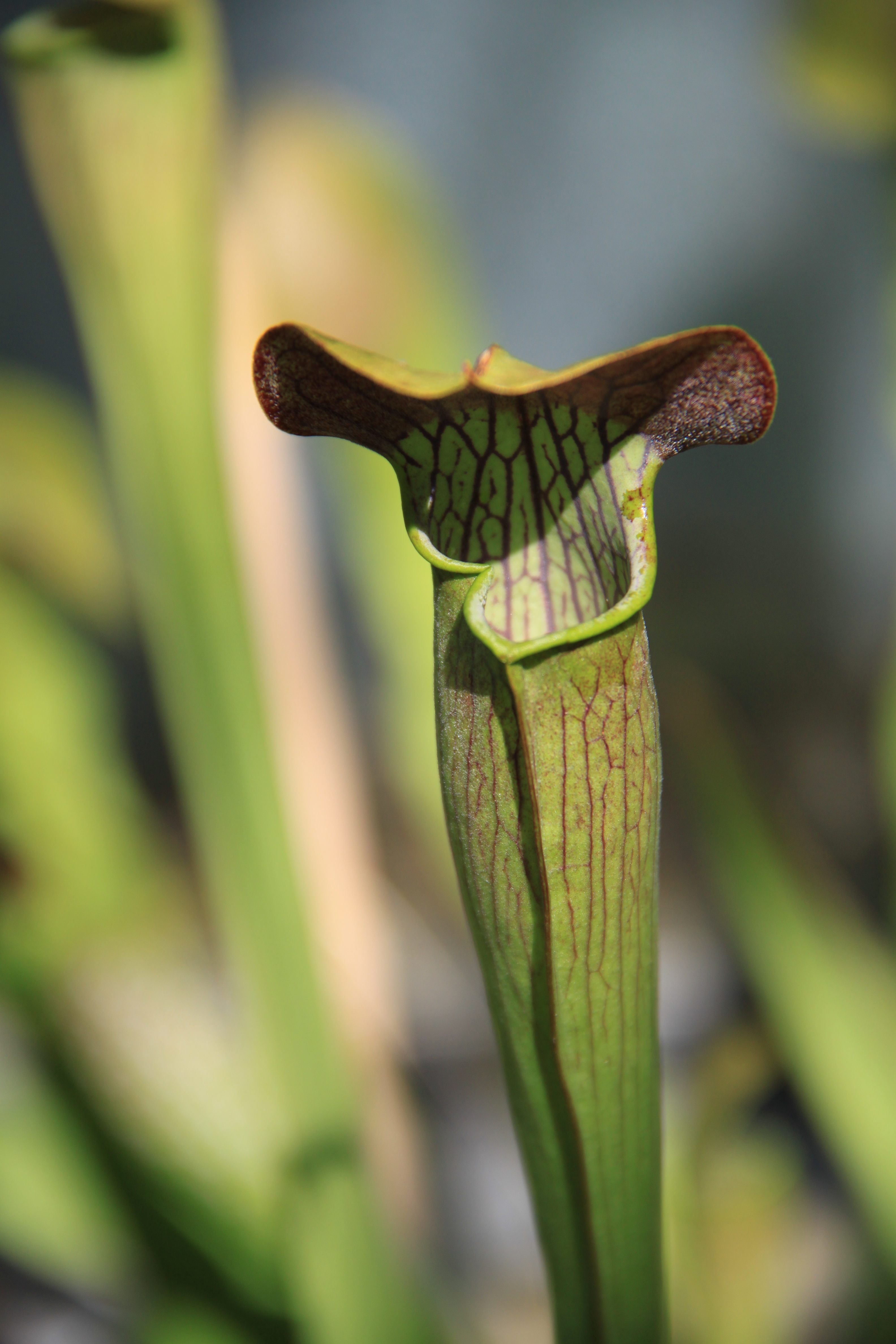 Muséum de Toulouse Native nameMuséum de ToulouseLocationToulouse, FranceCoordinates43° 35′ 37.89″ N, 1° 26′ 57.42″ E Established1796: established ; 1865: opened to publicWeb page control : Q422 VIAF: 130895847 ISNI: 0000 0001 2158 3469 SUDOC: 028667107 BNF: 120455376 Museofile: M7013 institution QS:P195,Q422